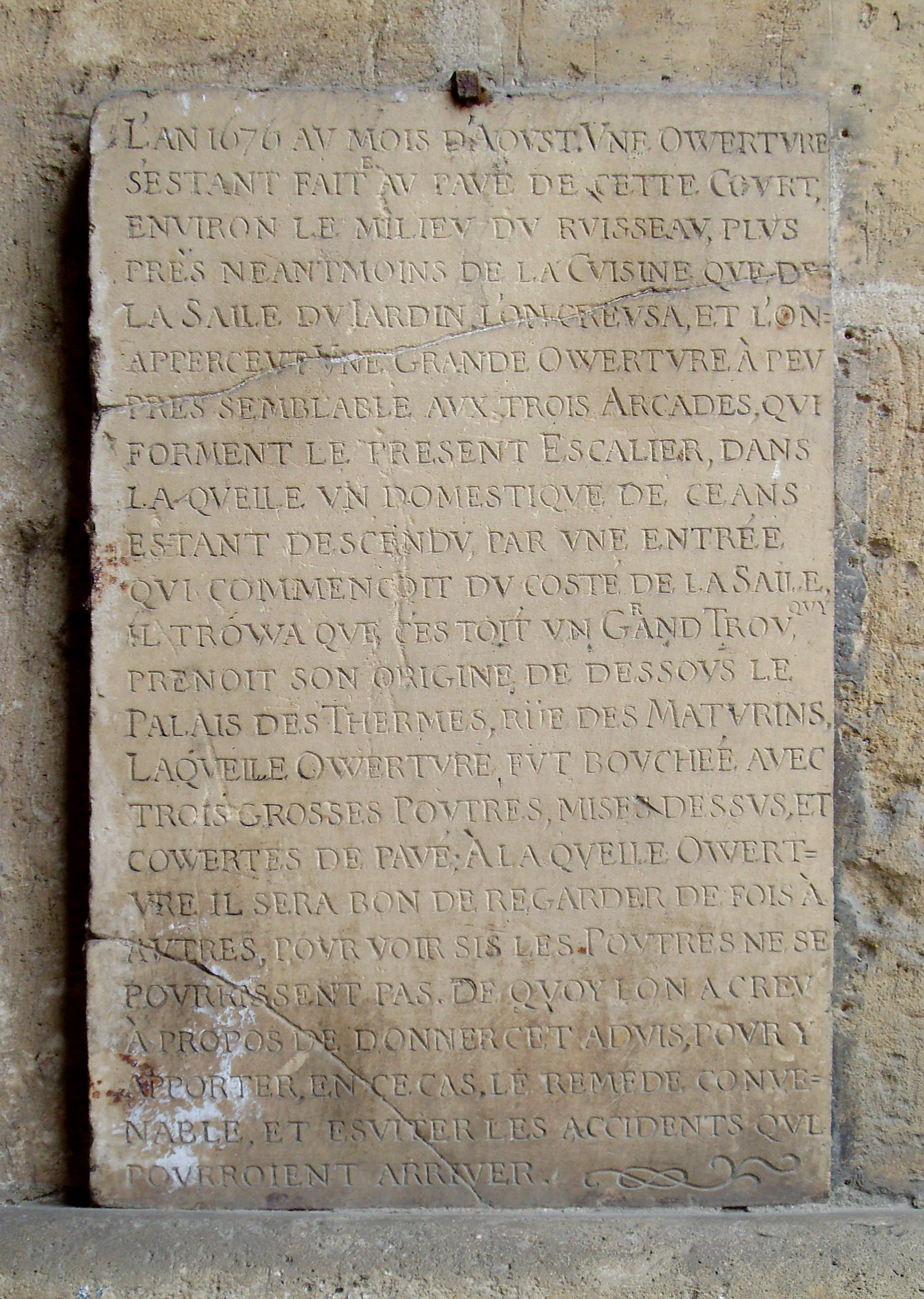 Plaque du XVIIe siècle mentionnant la découverte de souterrains. L'an 1676 av mois d'Aovst. Vune Owertvre s'estant faite av pavé de cette covrt, environ le miliev dv rvisseav, plvs près neantmoins de la Cvisine qve de la Salle dv Iardin, l'on crevsa, et l'on appercevt vune Grande Owertvre à pev près semblable avx trois Arcades, qvi forment le présent Escalier, dans la qvelle vn domestique de ceans estant descendv par vne entrée qvi commençoit dv costé de la Salle, il trowa que c'estoit un Grand Trov, qvy prenoit son origine de dessovs le Palais des Thermes, rüe des Matvrins, Laqvelle Owertvre fvt bovchée avec trois grosses Povtres, mises dessvs, et cowertes de pavé ; À la qvelle Owert- vre il sera bon de regarder de fois à autres, pour voir sis les Povtres ne se povrrissent pas. De qvoy l'on a creu à propos de donner cet advis, povr y apporter, en ce cas, le remede conve- nable, et esviter les accidents qvi povrroient arriver.